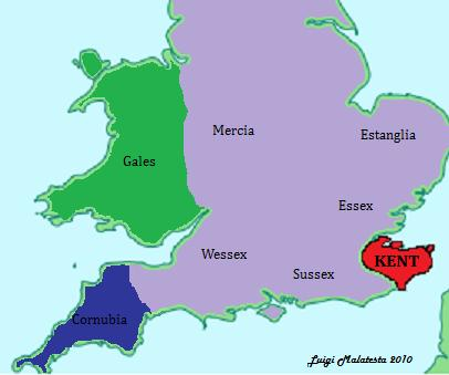 Situación del Reino de Kent